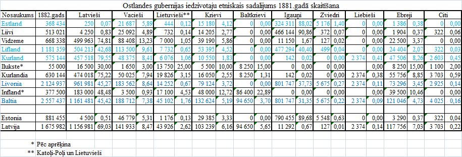 Этнический состав населения Балтийских губерний по ревизии 1881 года